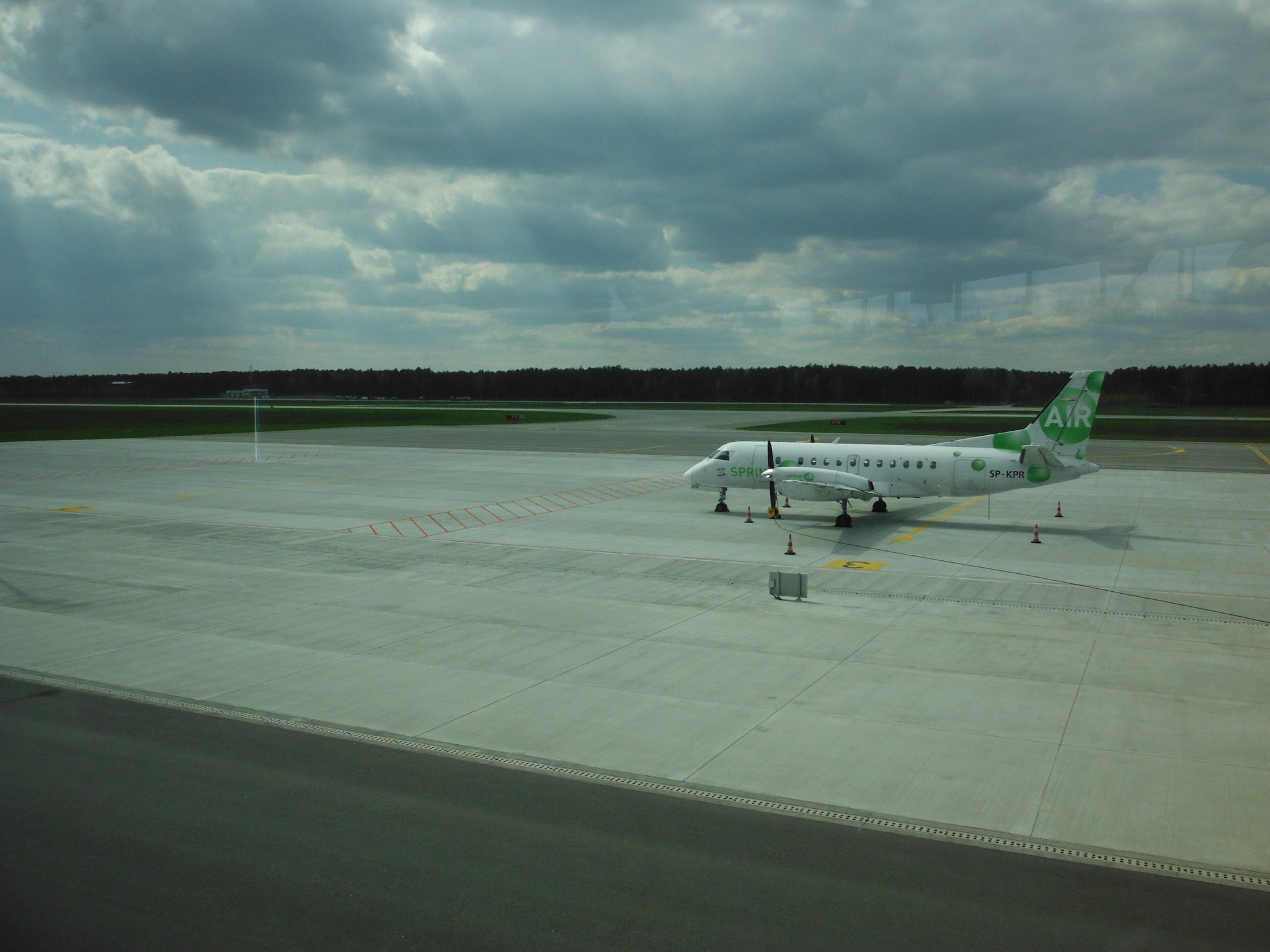 Port lotniczy Olsztyn-Mazury.